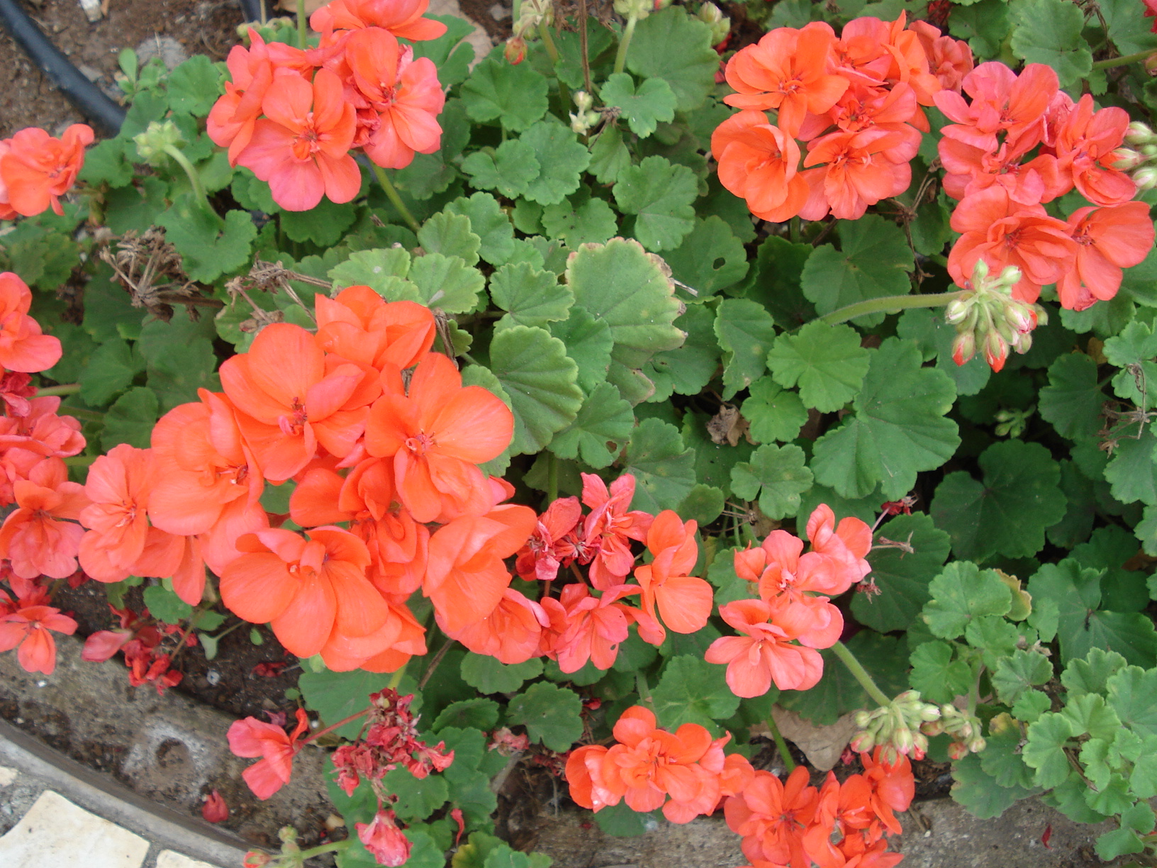 Flores da Madeira, 2012 Read more: Funchal Everyday